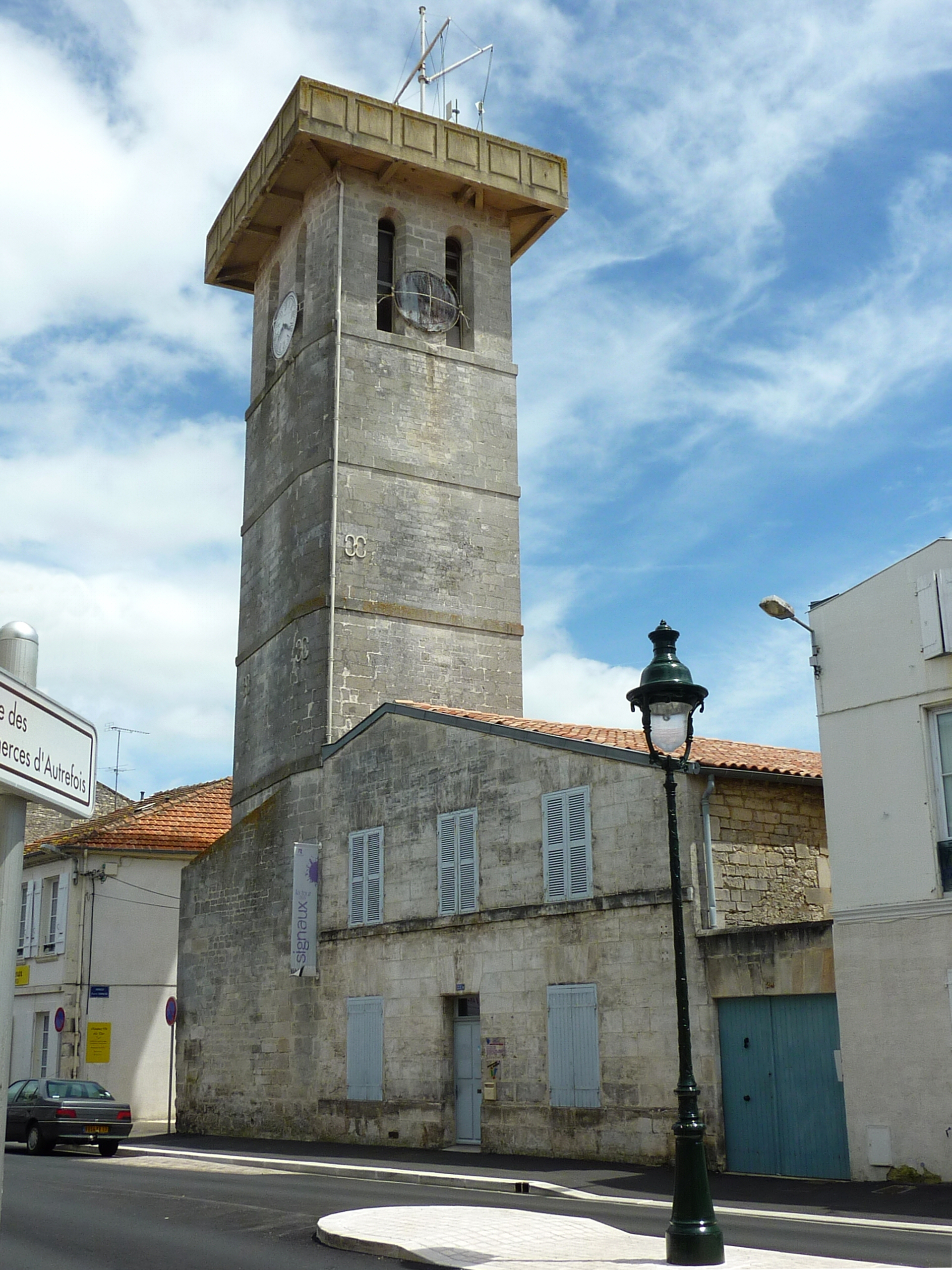 La tour des signaux Rochefort Charente Maritime France